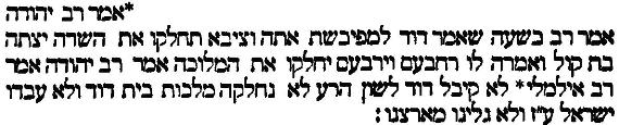 מאמרים של רב יהודה מן התלמוד הבבלי